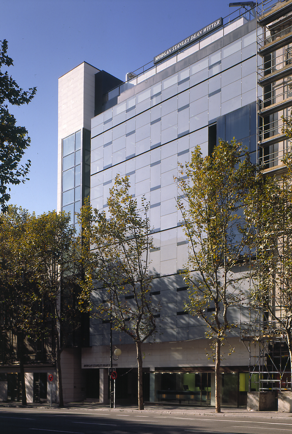 Allende Arquitectos